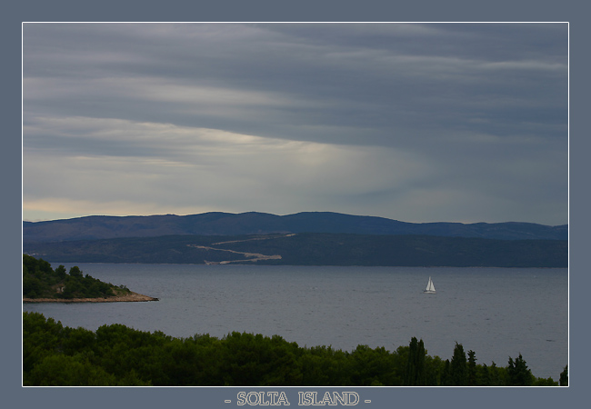 Solta Island